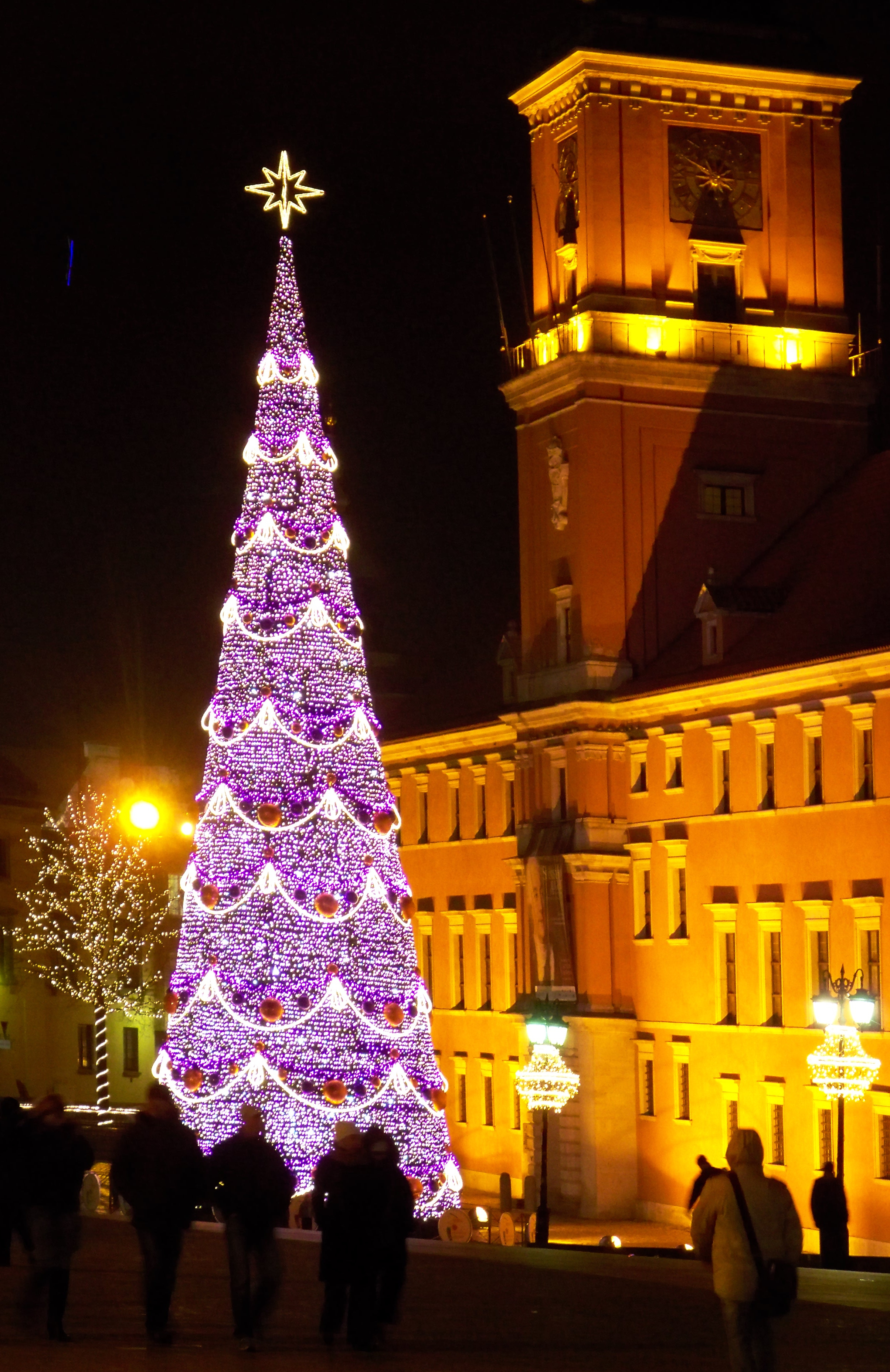 Choinka bożonarodzeniowa na pl. Zamkowym w Warszawie (2011).